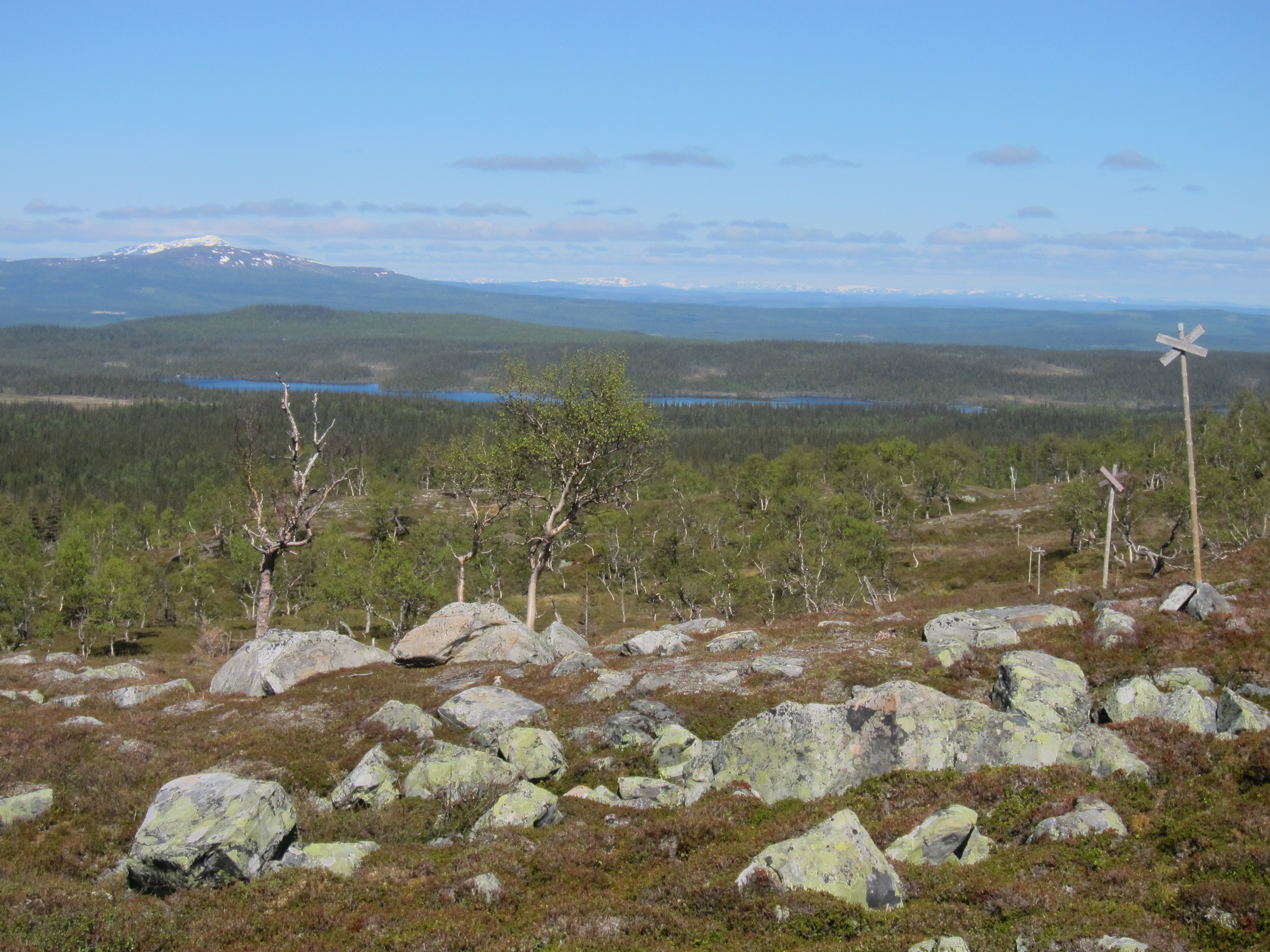 Västra vattensjön i Vålådalen.